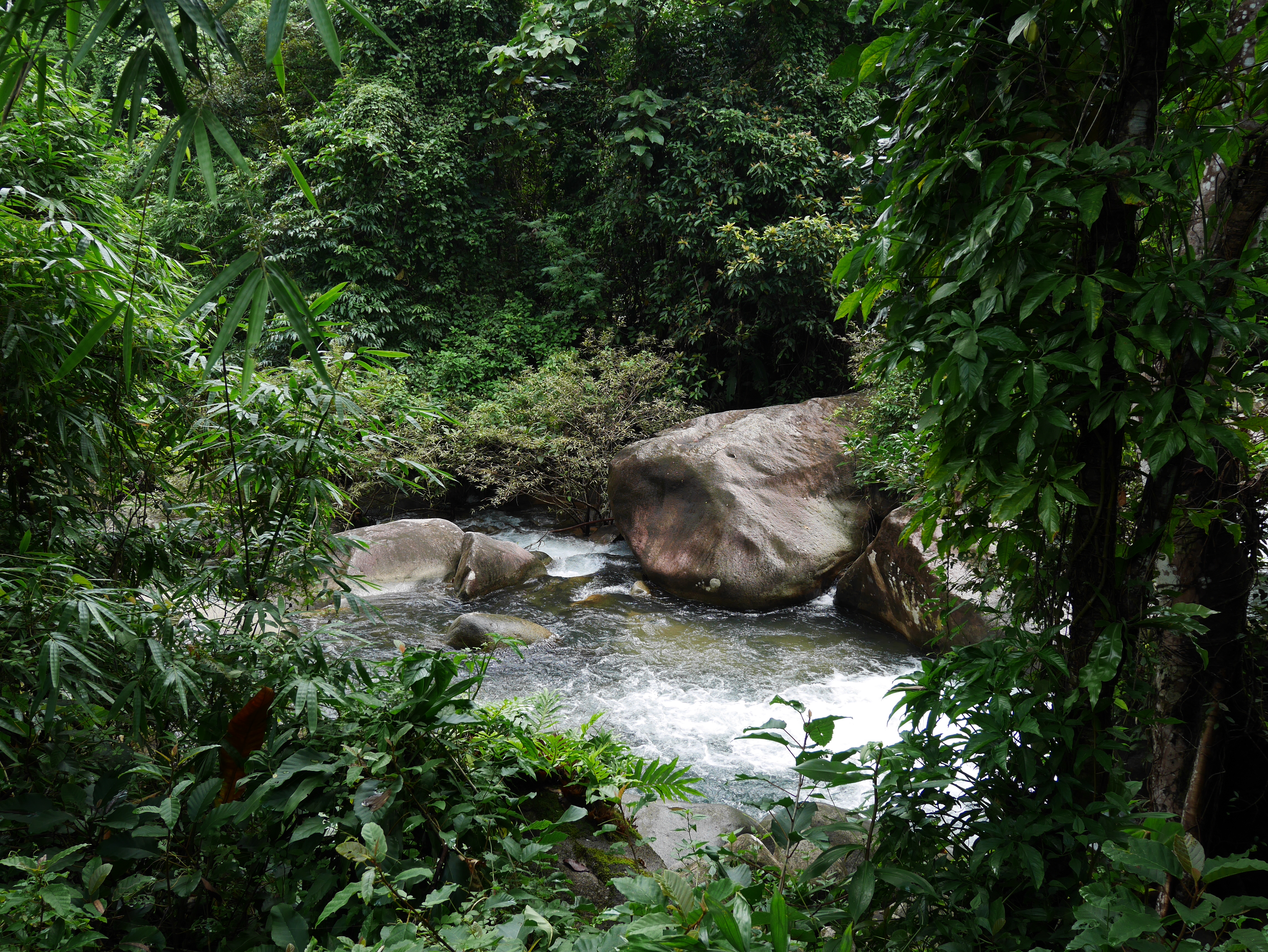 อุทยานแห่งชาติน้ำตกพลิ้ว